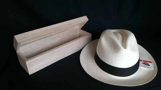 Sombrero de paja toquilla enrollado en una caja, para su venta.